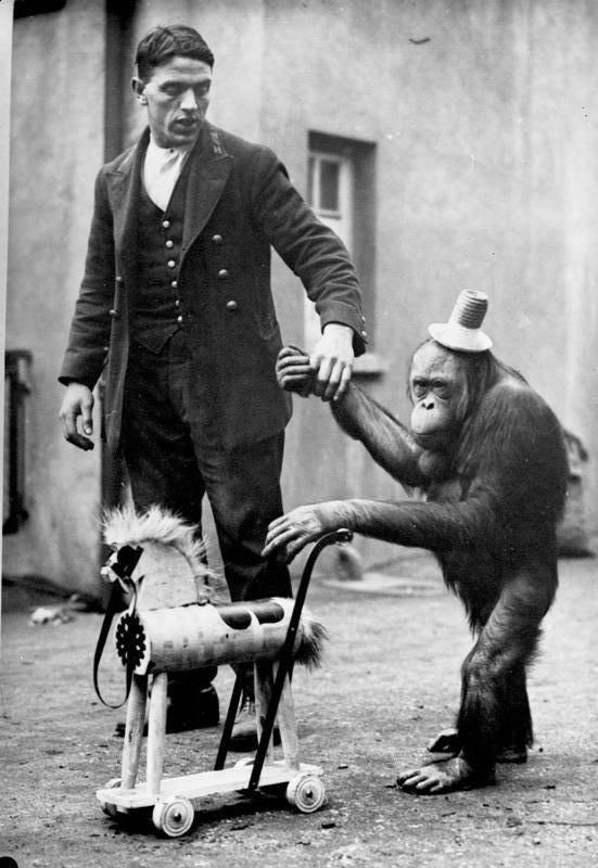 "Morphy", ein englischer Wunderaffe beim Spaziergang ! "Morphy", ein englischer Wunderaffe, welcher in einem Wanderzirkus auftritt, mit seinem Spielzeug, einem Pferdchen, auf einem Spaziergang mit seinem Wärter.